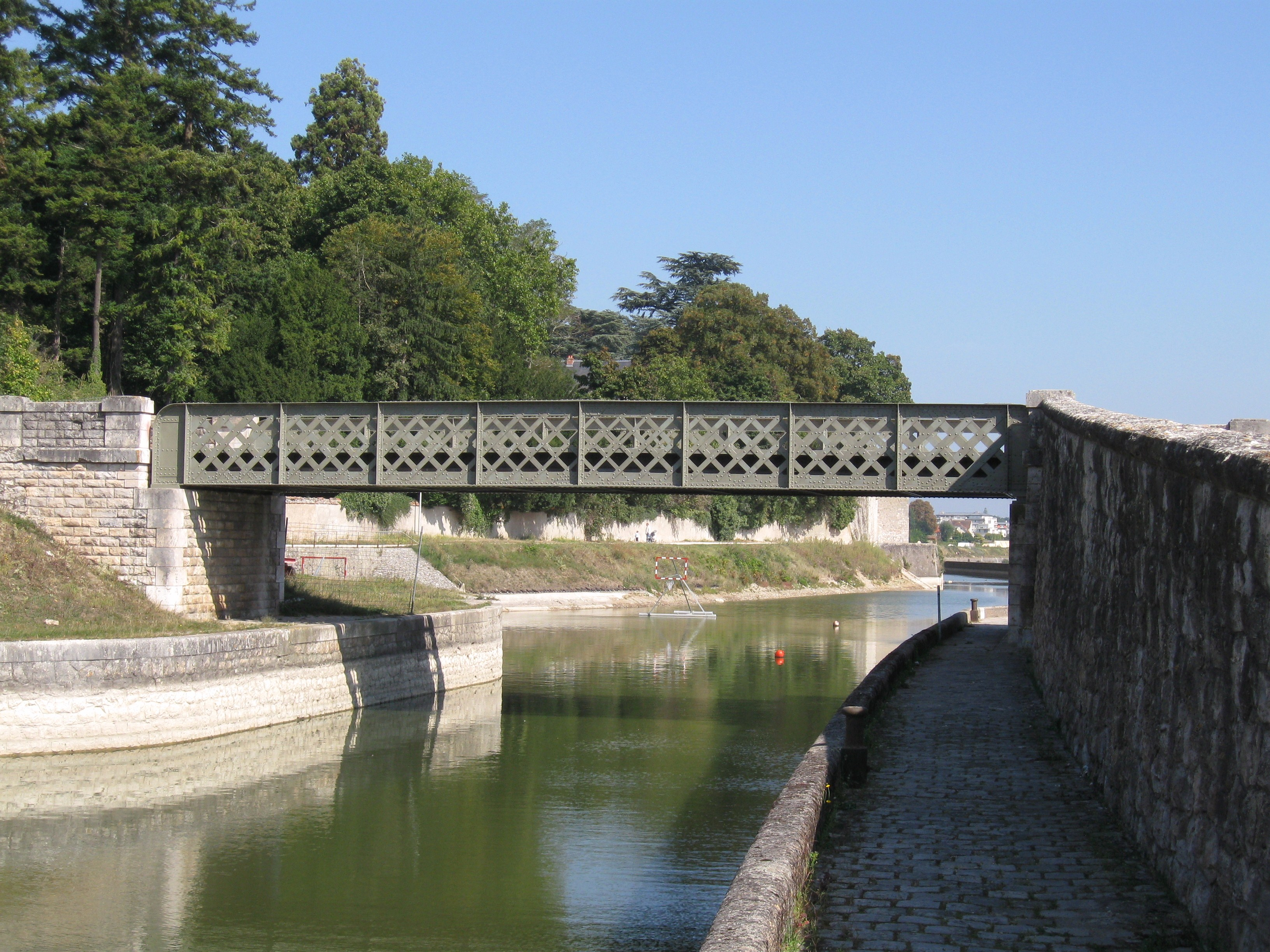 Le canal d'Orléans à Saint-Loup, Saint-Jean-de-Braye, Loiret, France